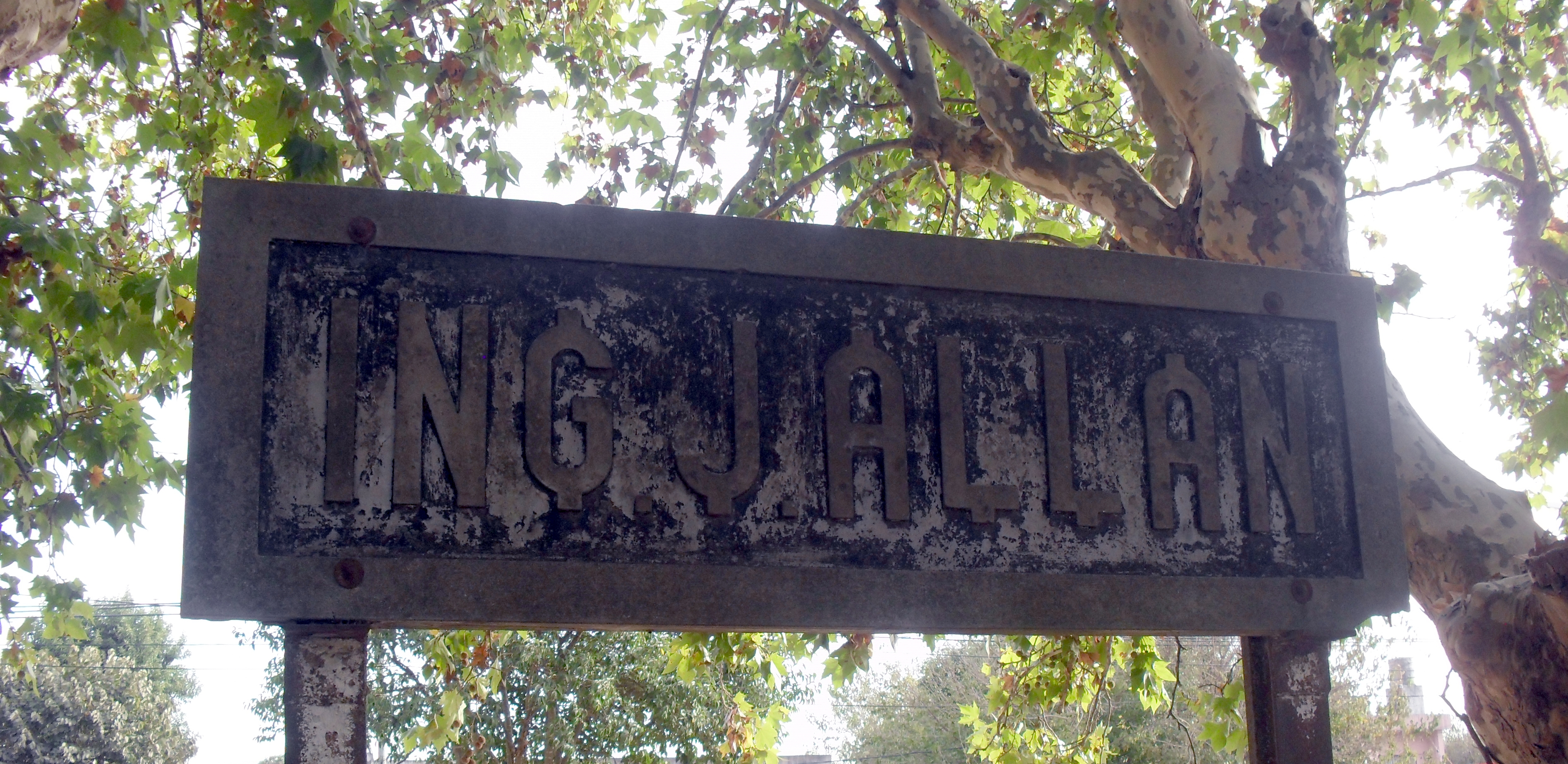 Antigua Estación Ingeniero Allan